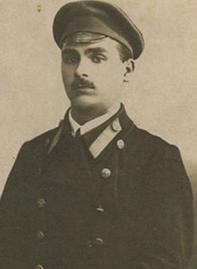 Gimnaziyakı şəkili, 1917 il.